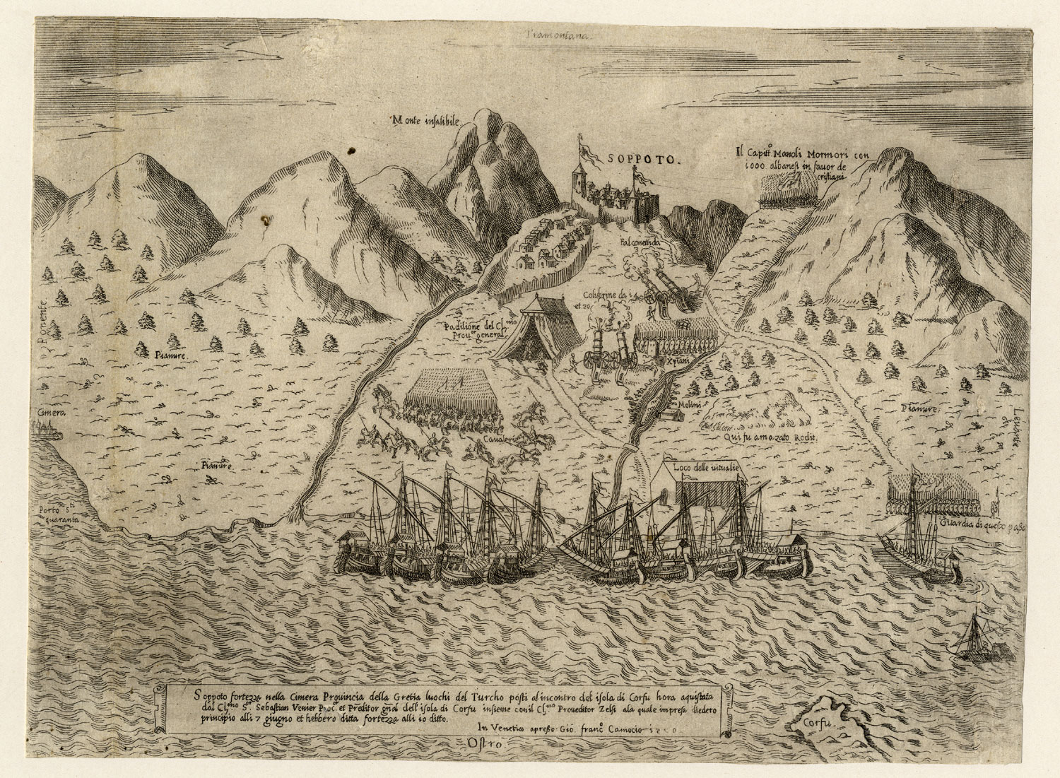 Soppoto, fortezza nella Cimera provincia della Gretia luochi del Turcho ... (Einnahme von Sopoto in Albanien); Kupferstich, 1570